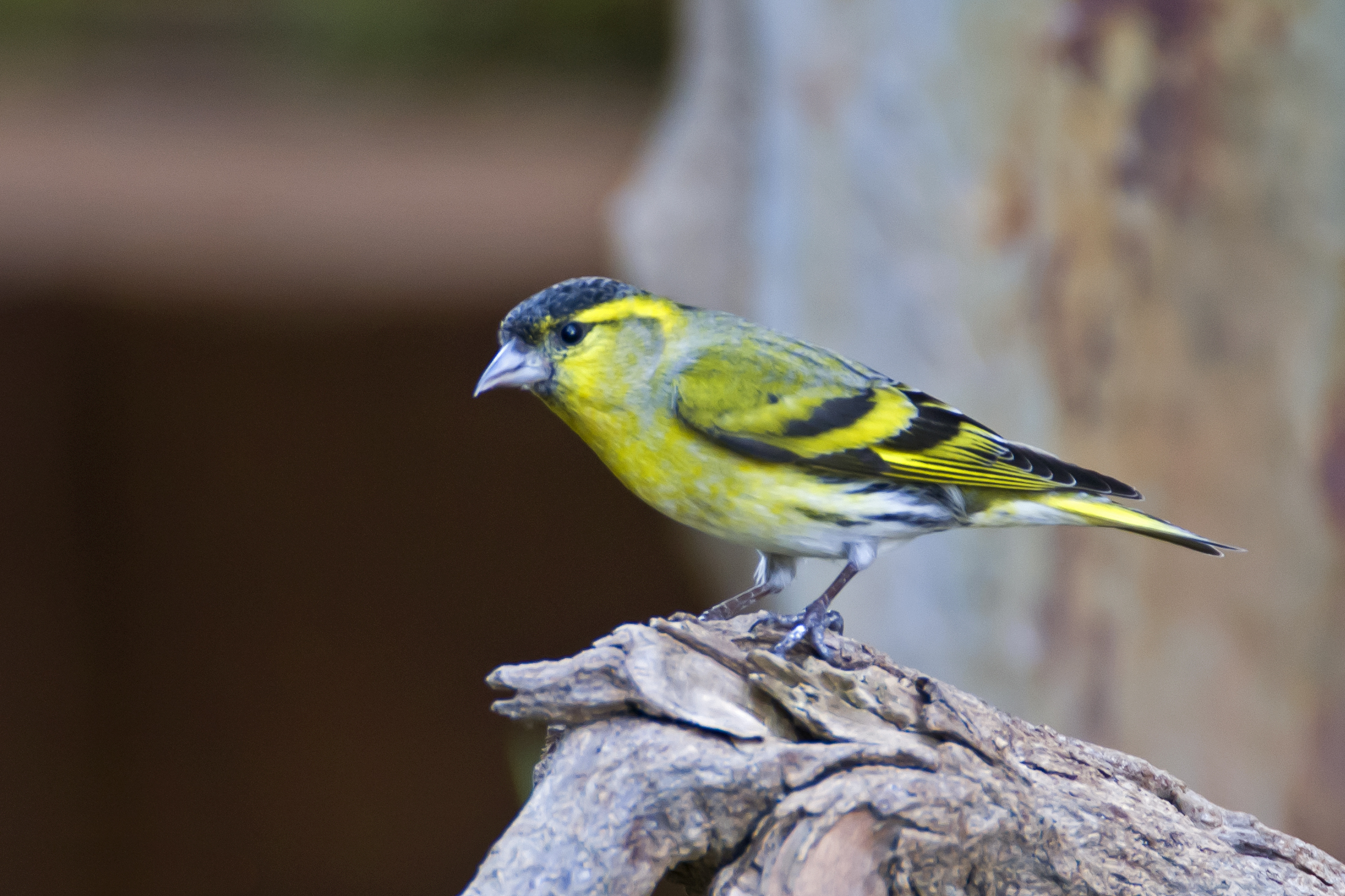 En Canarias Invernante irregular. Sigma 120-300 f2,8 + TCx14